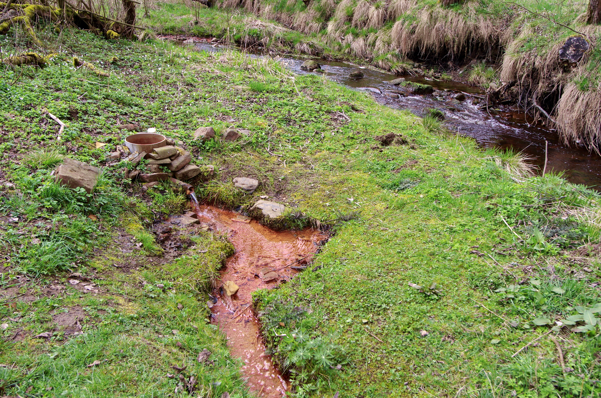 Pramenský potok a Barochův pramen v Pramenech, okres Cheb